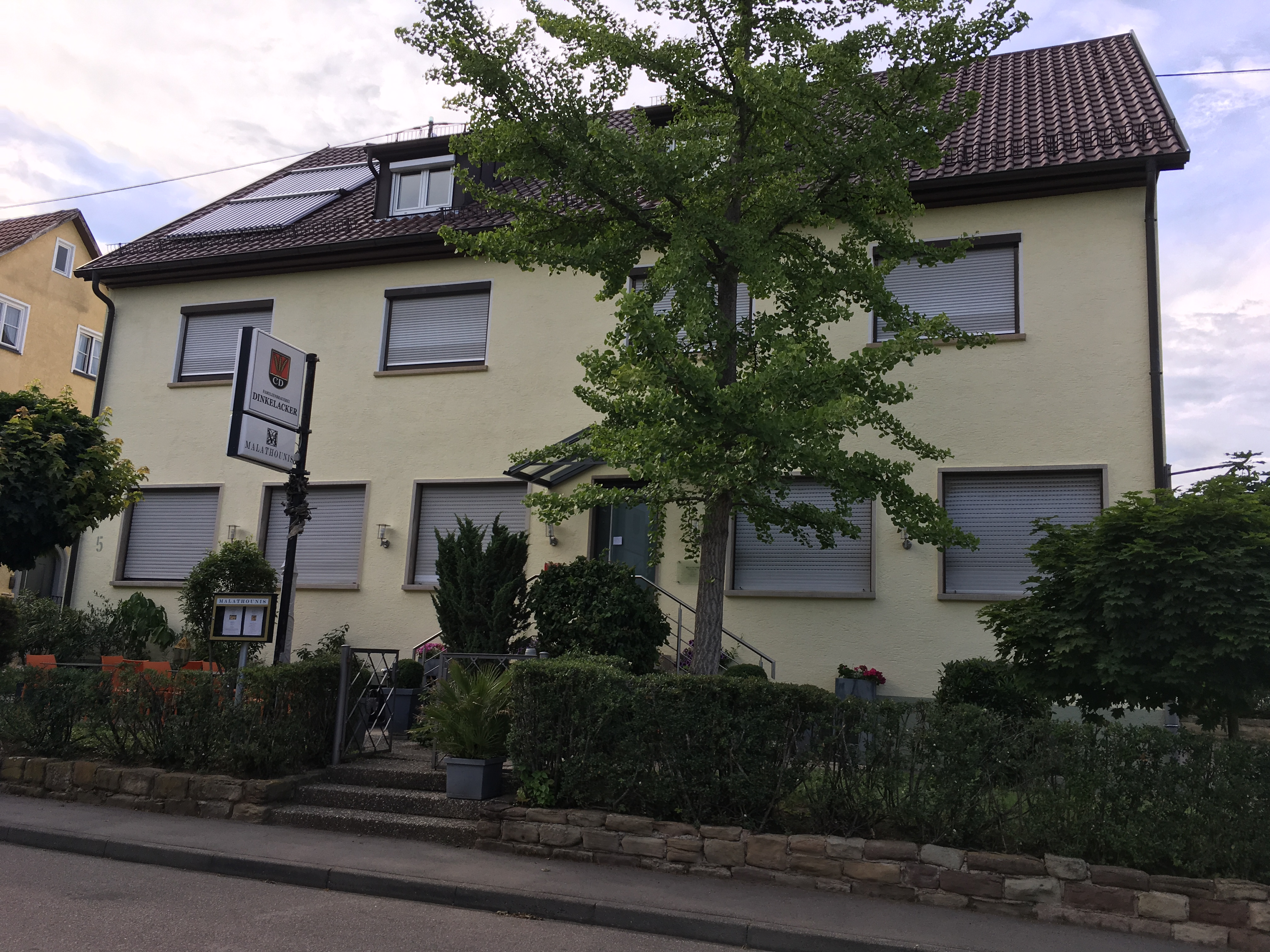 Das Sterne Restaurant Malathounis im Ortsteil Stetten von Kernen im Remstal.